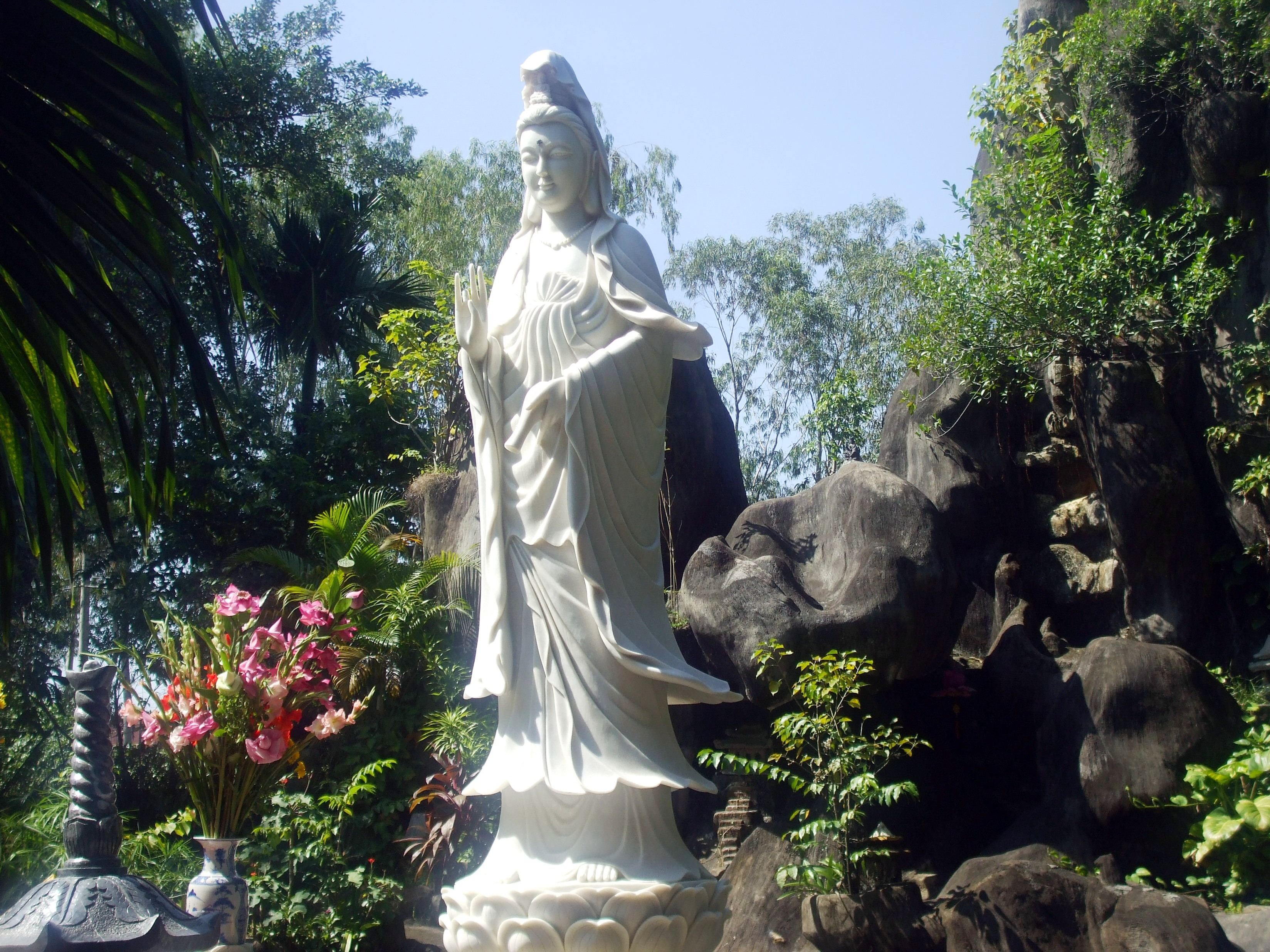 Tượng Bồ tát Quan Thế Âm bằng cẩm thạch trắng cao 5m trong khuôn viên Chùa Hoằng Pháp thuộc Thành phố Hồ Chí Minh (Việt Nam).